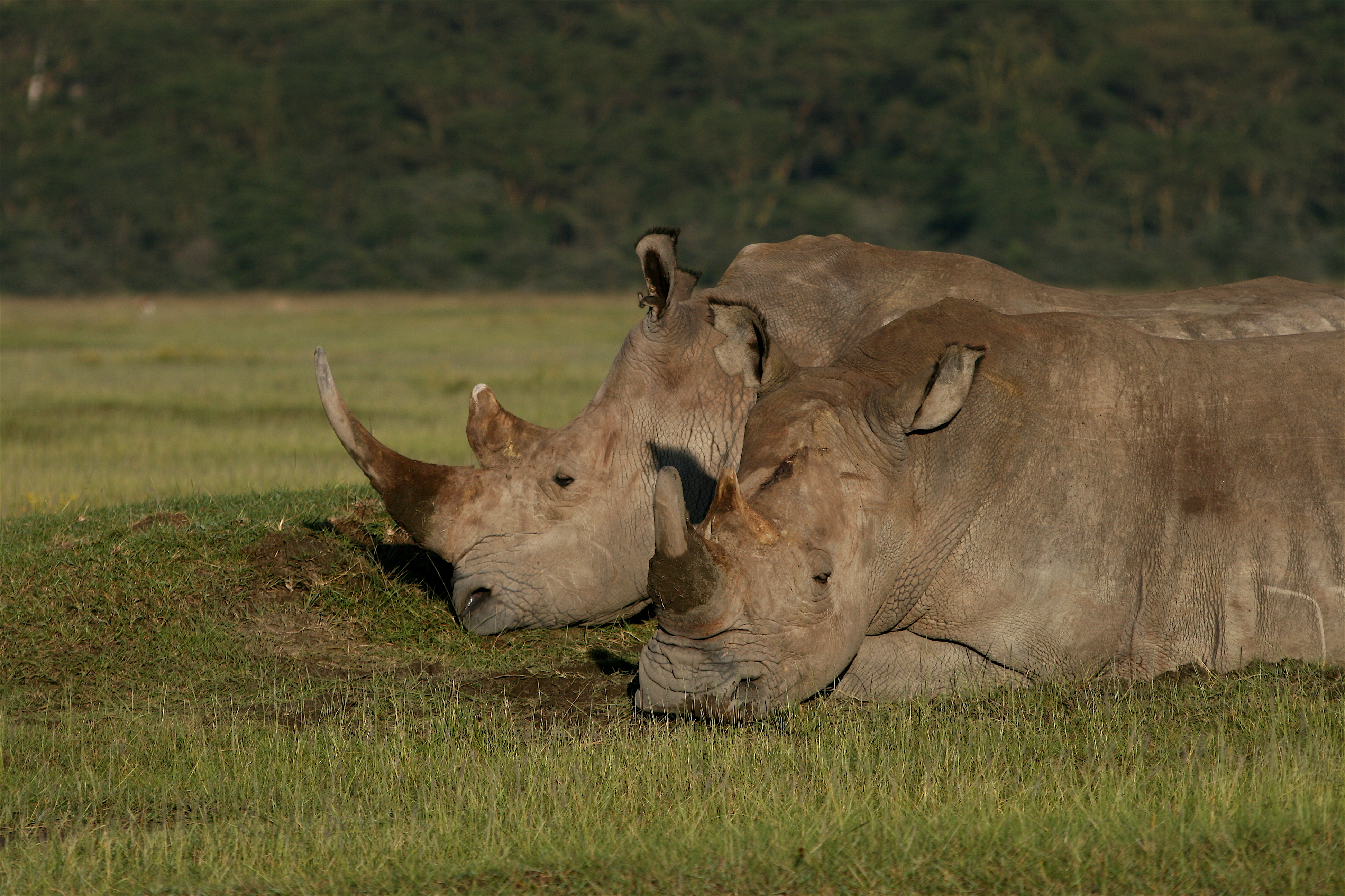 White Rhinoceros. Lake Nakuru National Park, Kenya